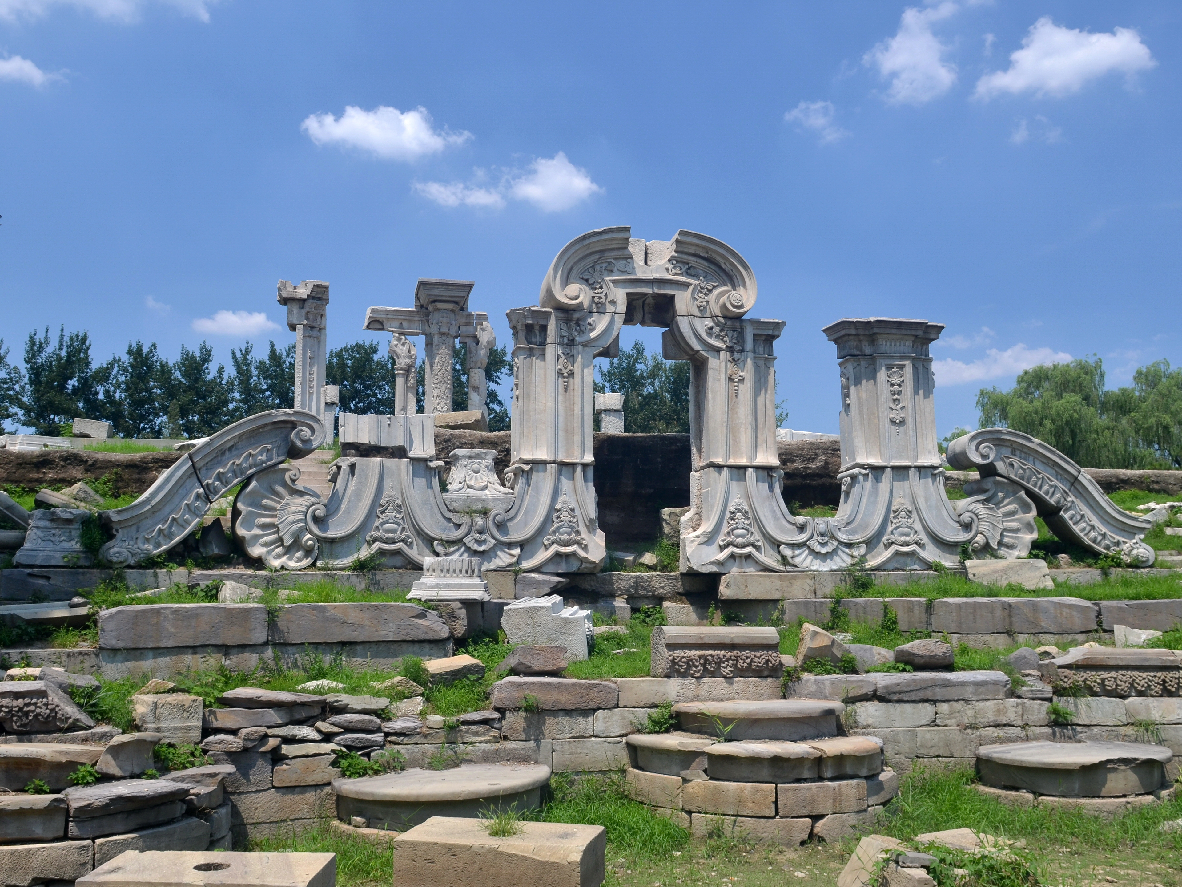 中文（中国大陆）: 大水法残迹